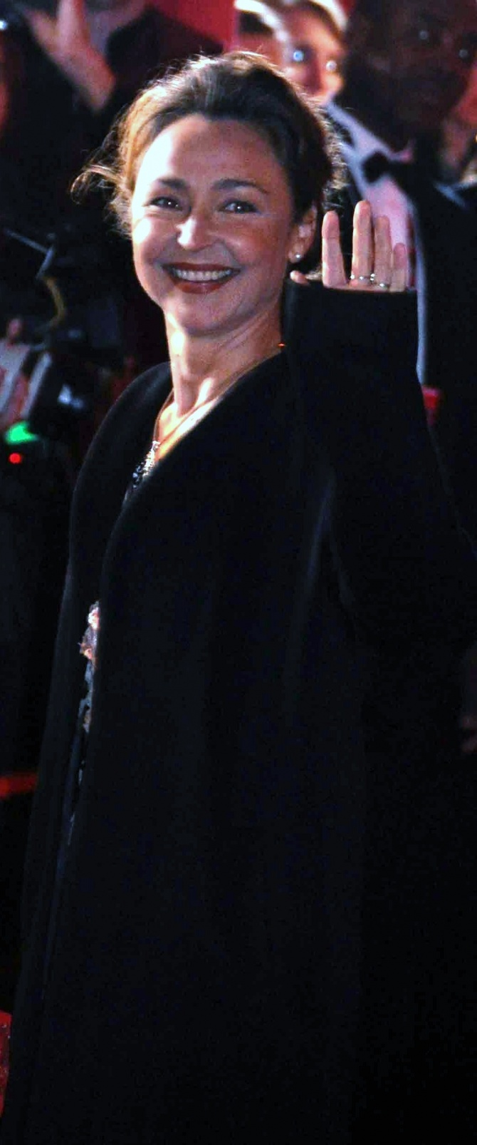 Catherine Frot à la cérémonie des César.